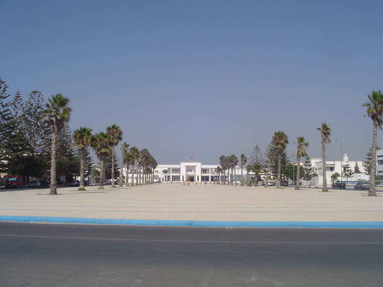 Essaouira city